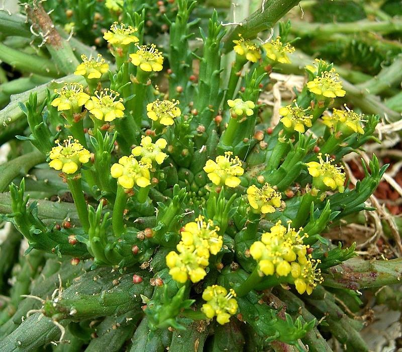 Euphorbia pugniformis = Euphorbia procumbens